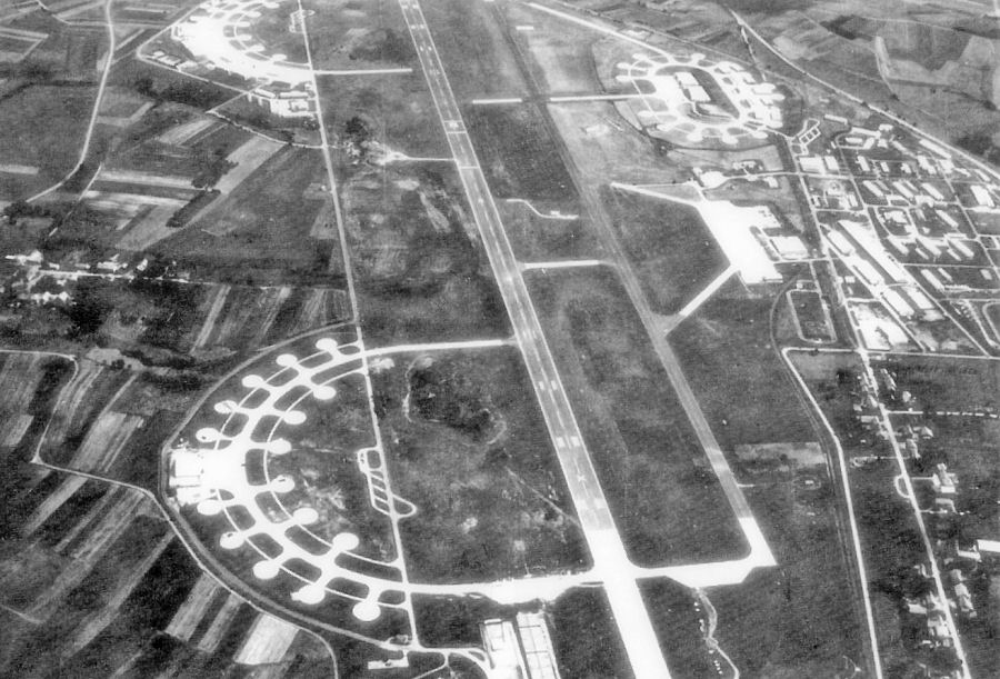 Phalsbourg-Bourscheid Air Base, France - Fall 1956